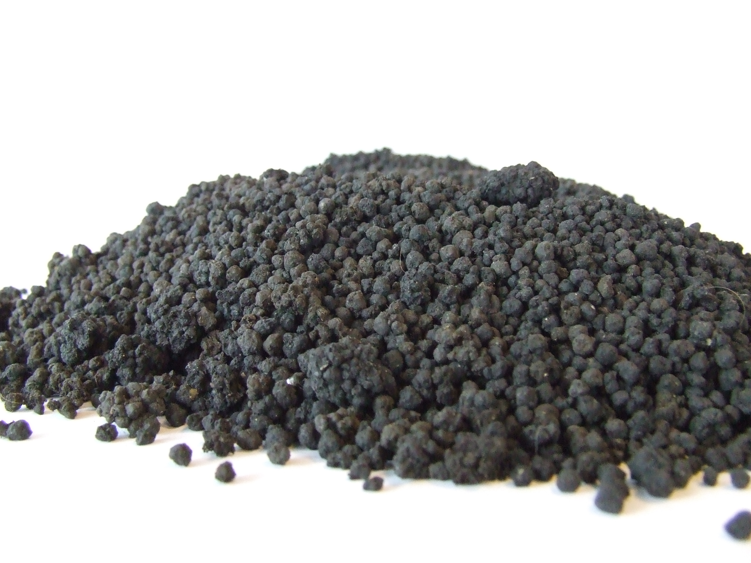 Granulaat